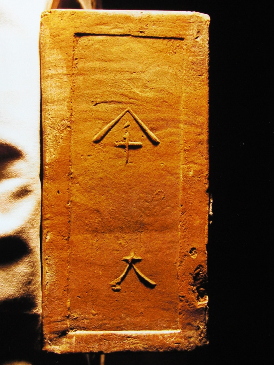 竹内仙太郎製造 菅島灯台建造用煉瓦 1872年頃製造 菅島灯台付近にて出土